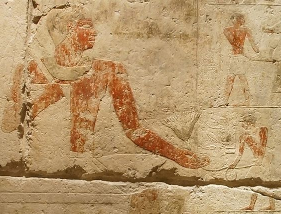 Représentation de Seshmnefer III, mur Ouest salle des offrandes, conservé au musée univ. de Tübingen.